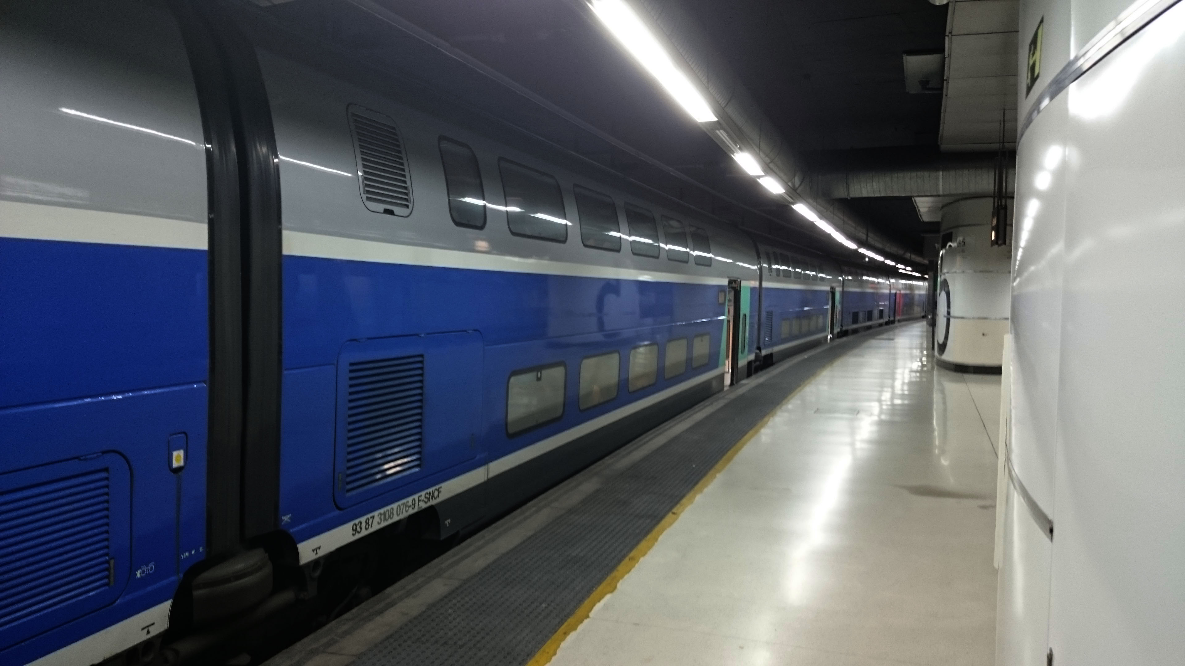 Franse TGV in Barcelona Sants